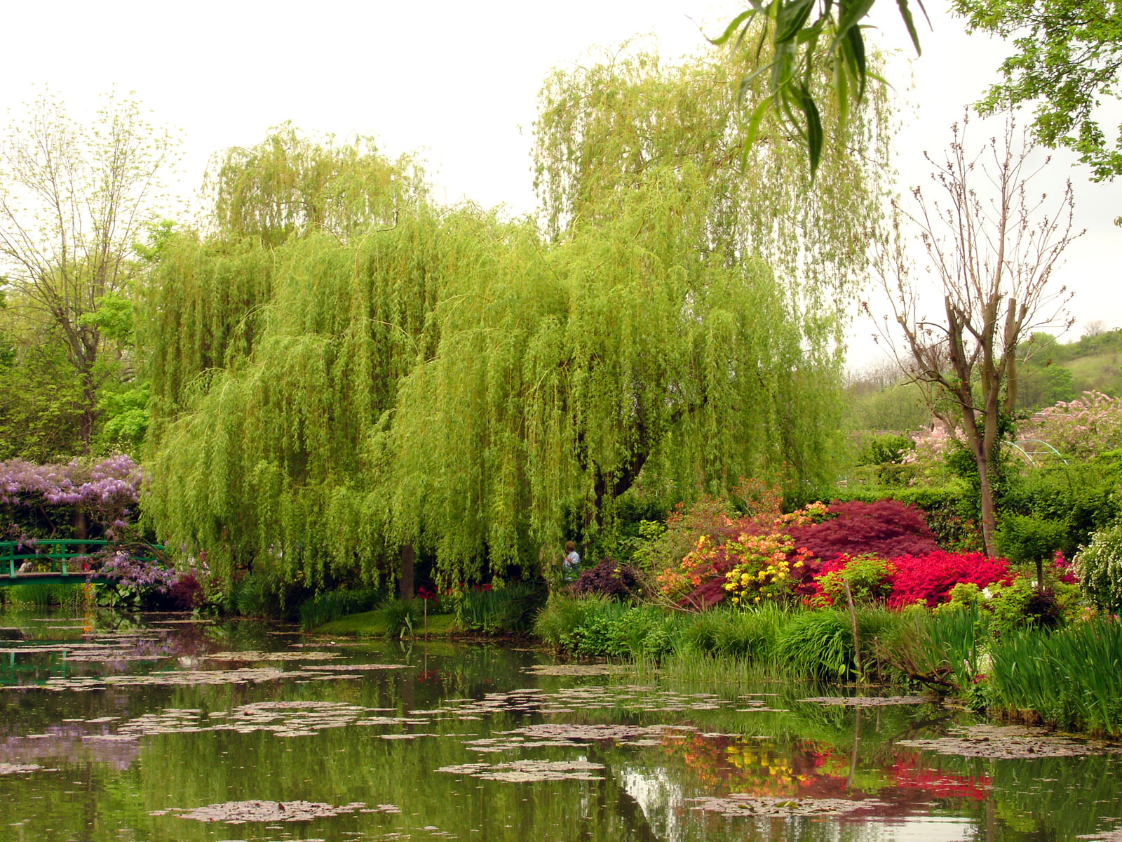 Monet garden in Giverny, Eure, France